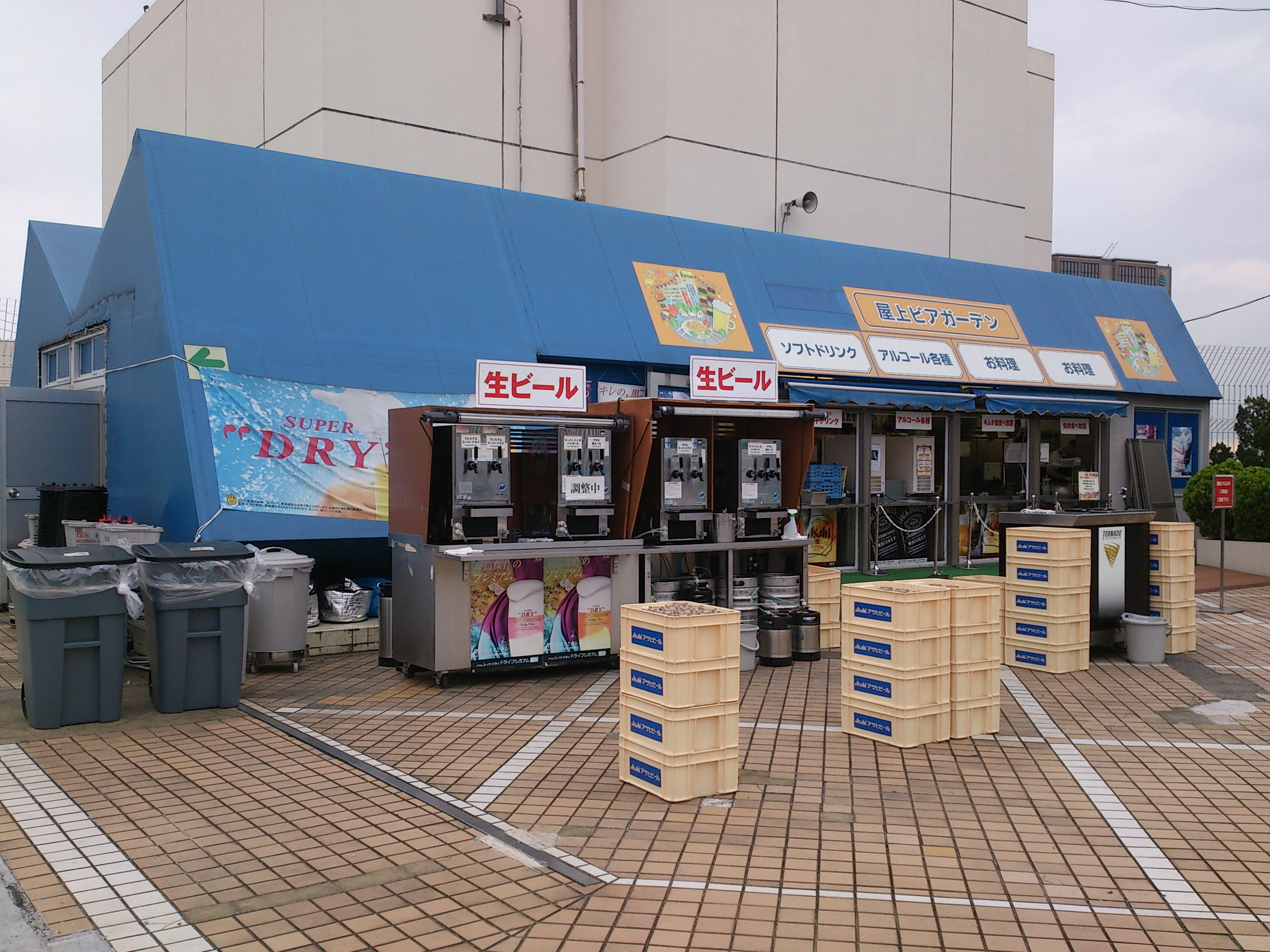 2900円で飲み放題食べ放題